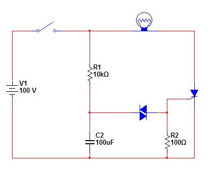 Deze tekening heb ik zelf opgemaakt.